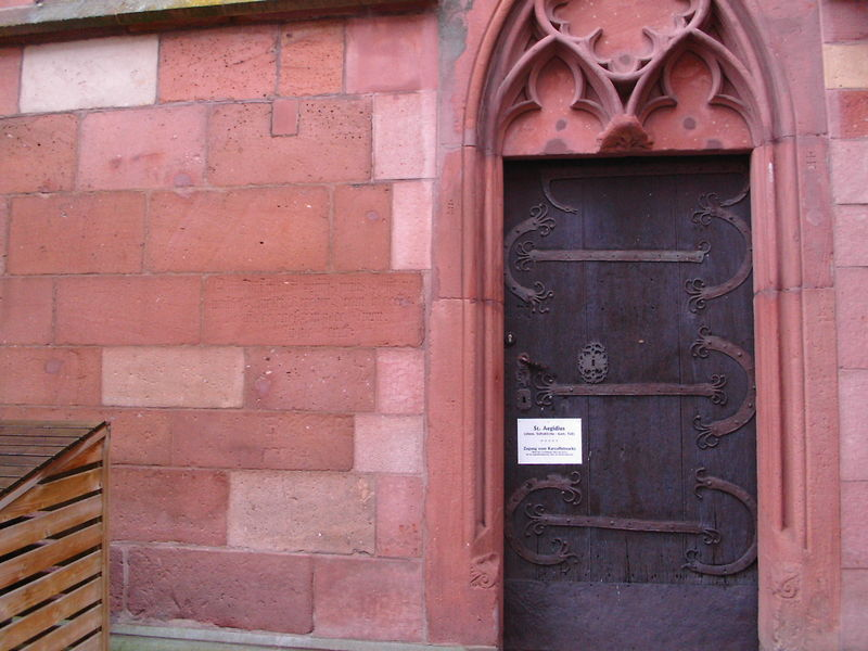 Laurentius Kercher, letzter Stiftsdekan, Grabstein, Stiftskirche Neustadt an der Weinstraße